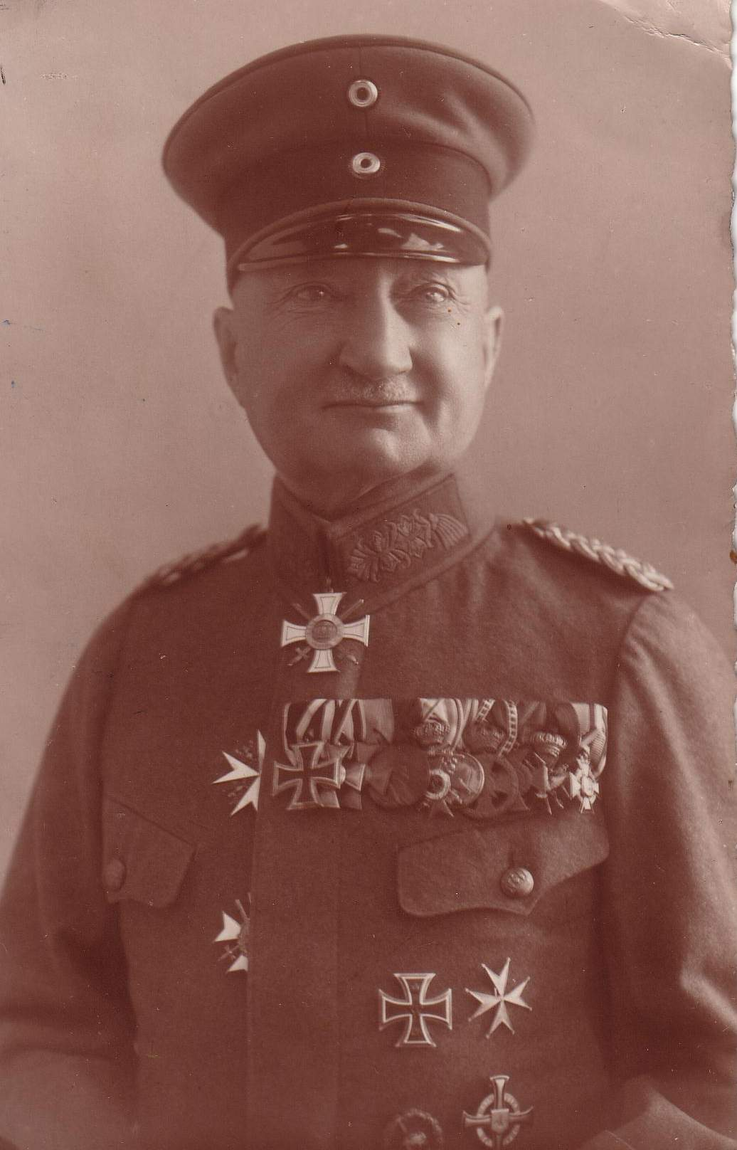 General Bruno von Kern